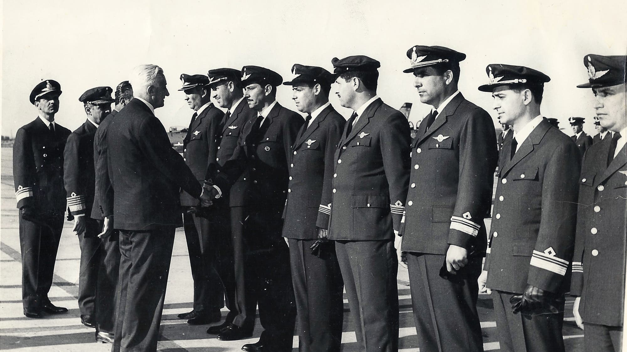 Arturo Umberto Illia, el entonces Presidente de la Nación, saluda a los tripulantes del TC-48